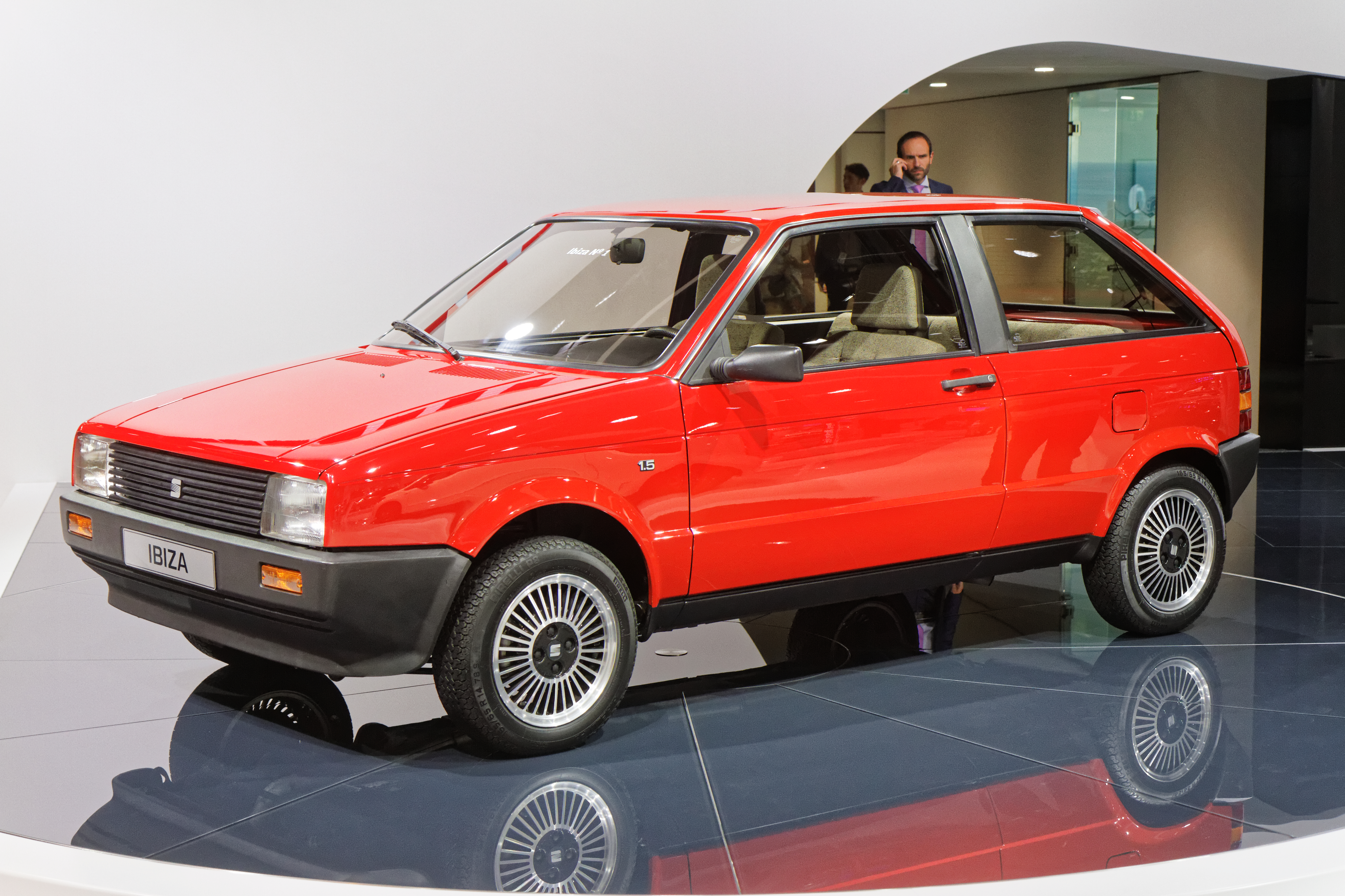 Une Seat Ibiza première génération présentée lors du mondial de l'automobile de Paris 2014.